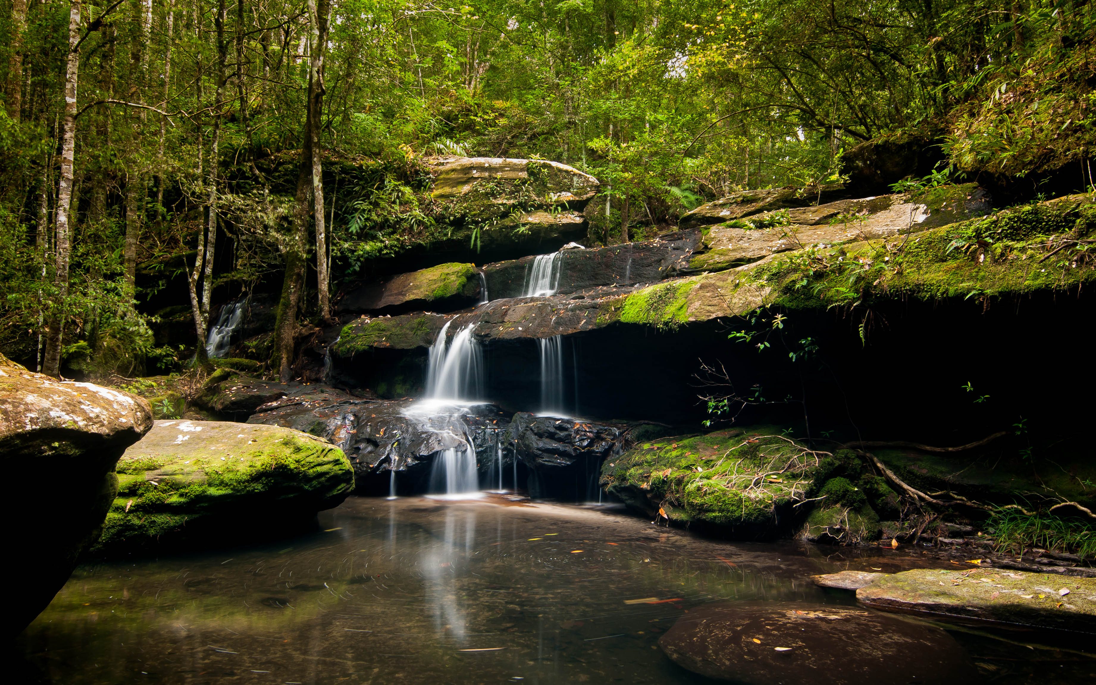 อุทยานแห่งชาติภูกระดึง